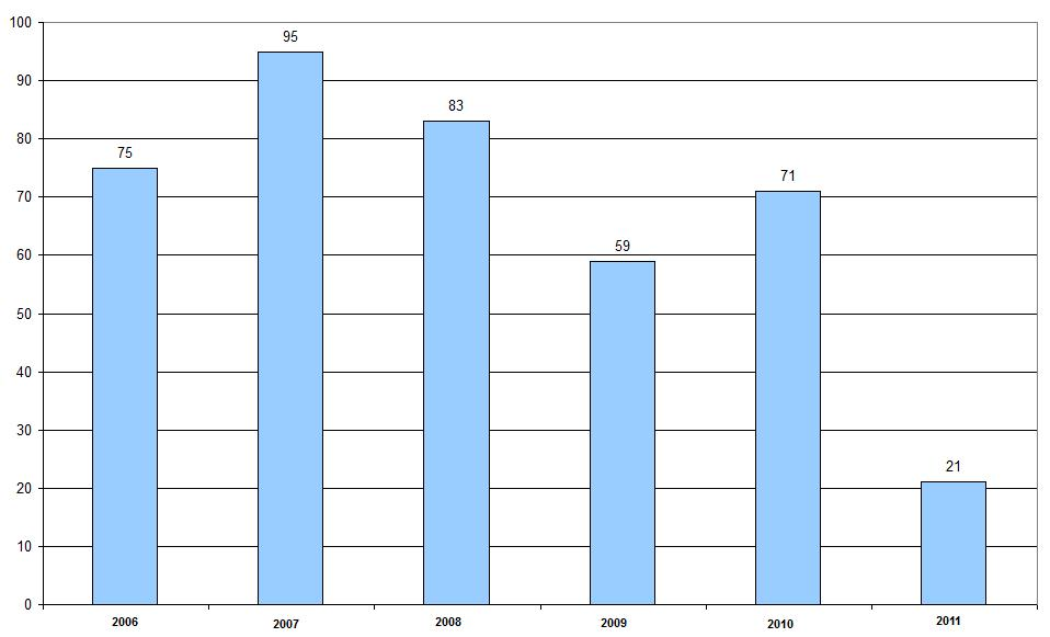 Nombre de ventes annuelles d'habitations, à Hartford (Michigan, Etats-Unis).